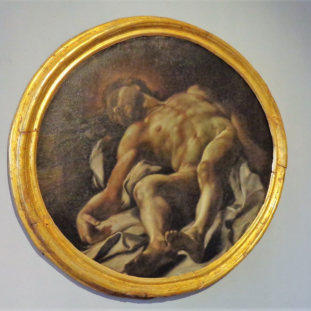 Cristo morto o Cristo deposto di Mattia Preti